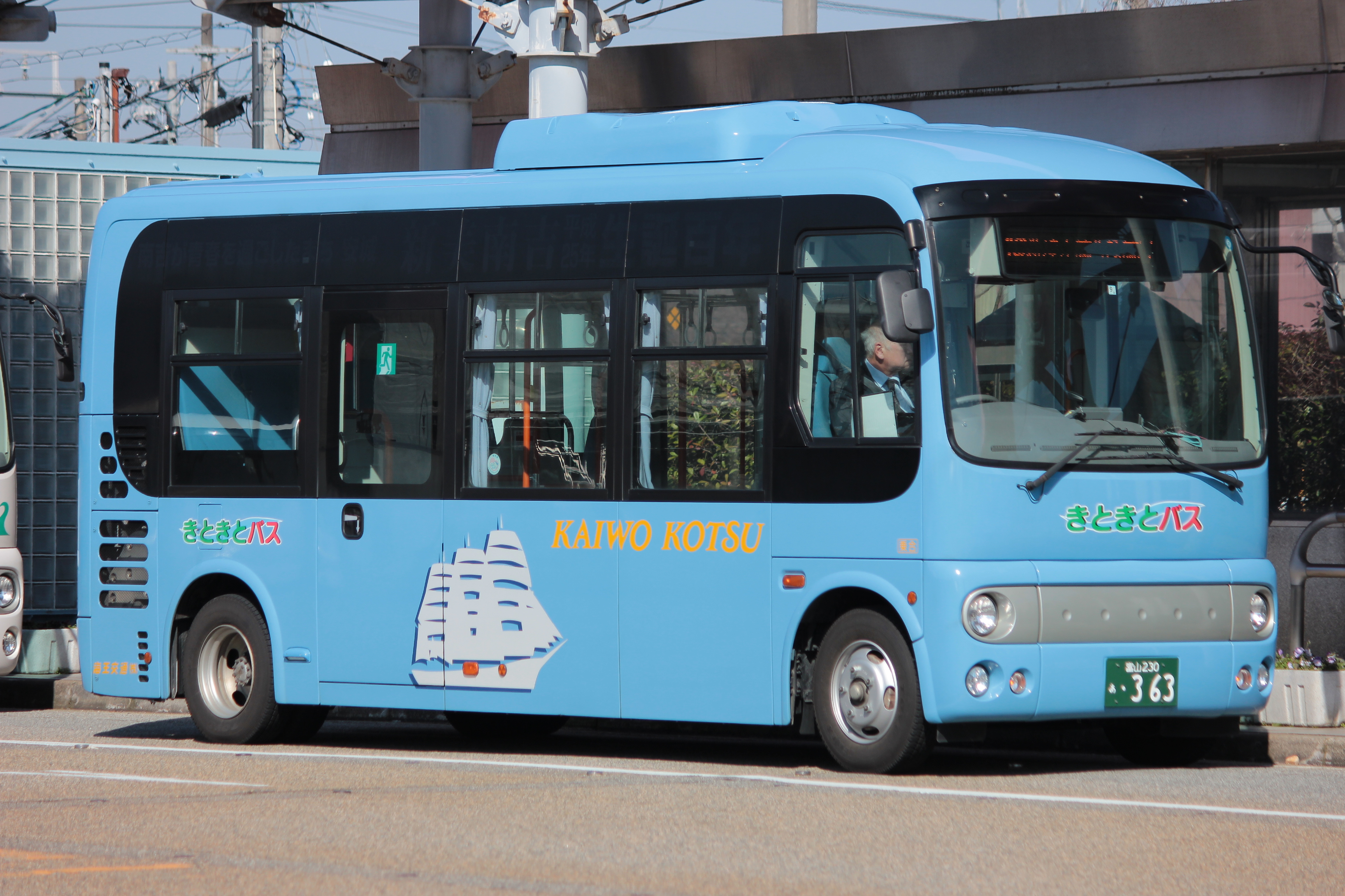 富山県射水市のコミュニティバス「きときとバス」。海王交通の車両。 Canon EOS Kiss X5